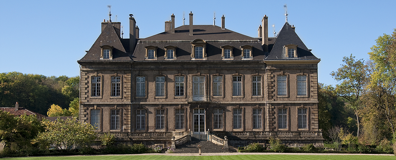 Vue des jardins sur le château de La Grange à Manom